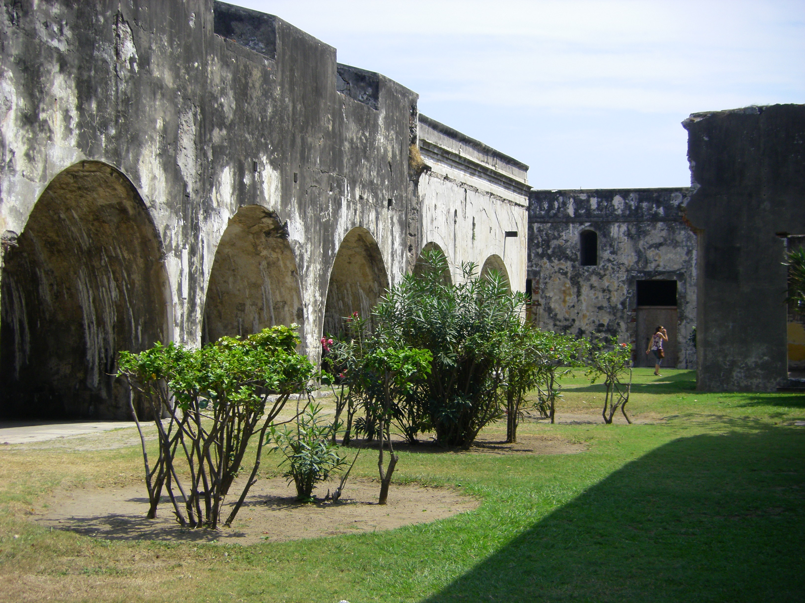 Innenaufnahme des Forts in Veracruz